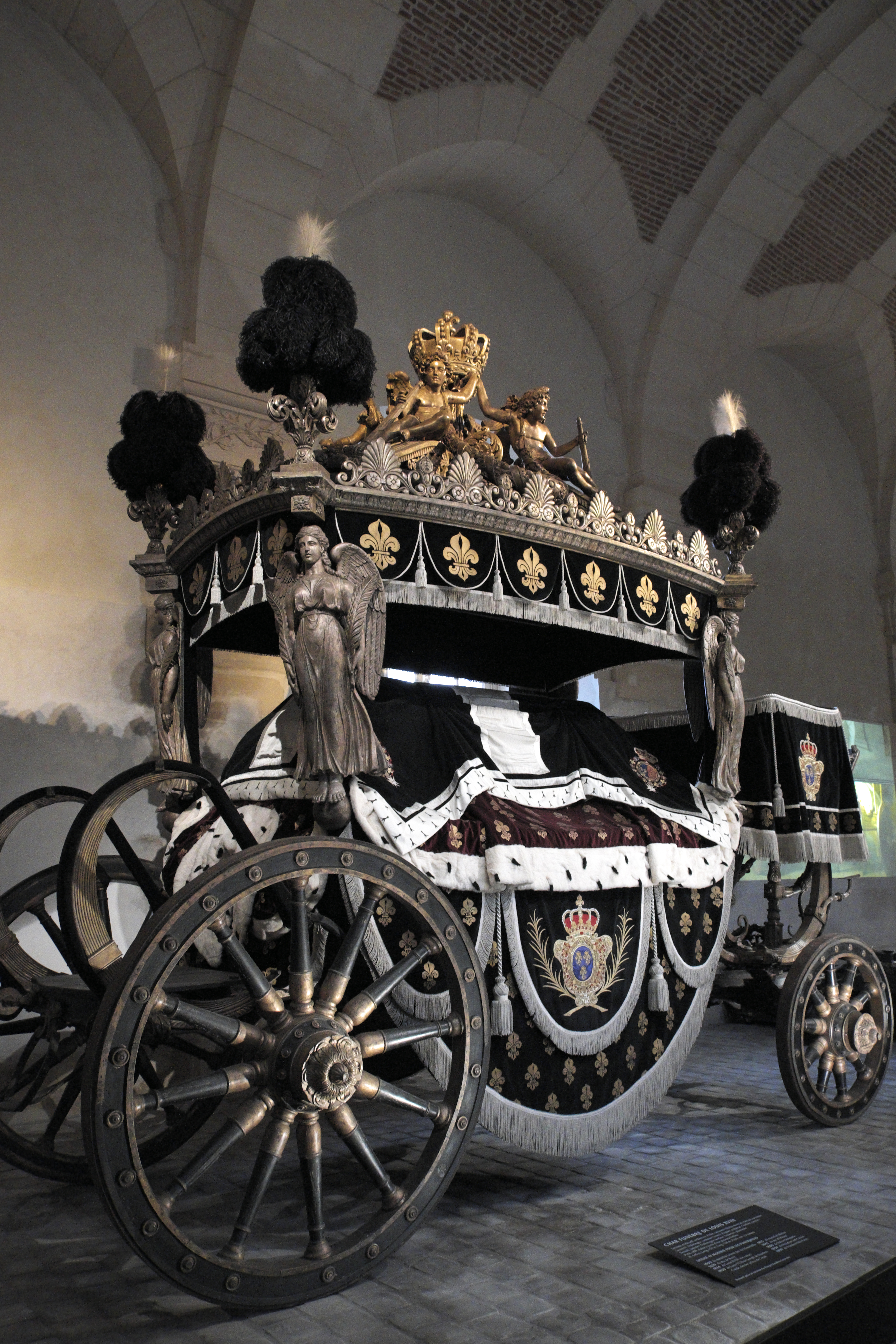 Kutschenmuseum, Galerie des Carosses, in der Grande Écurie des Schlosses von Versailles im Département Yvelines (Region Île-de-France/Frankreich), Leichenkutsche für Ludwig XVIII.